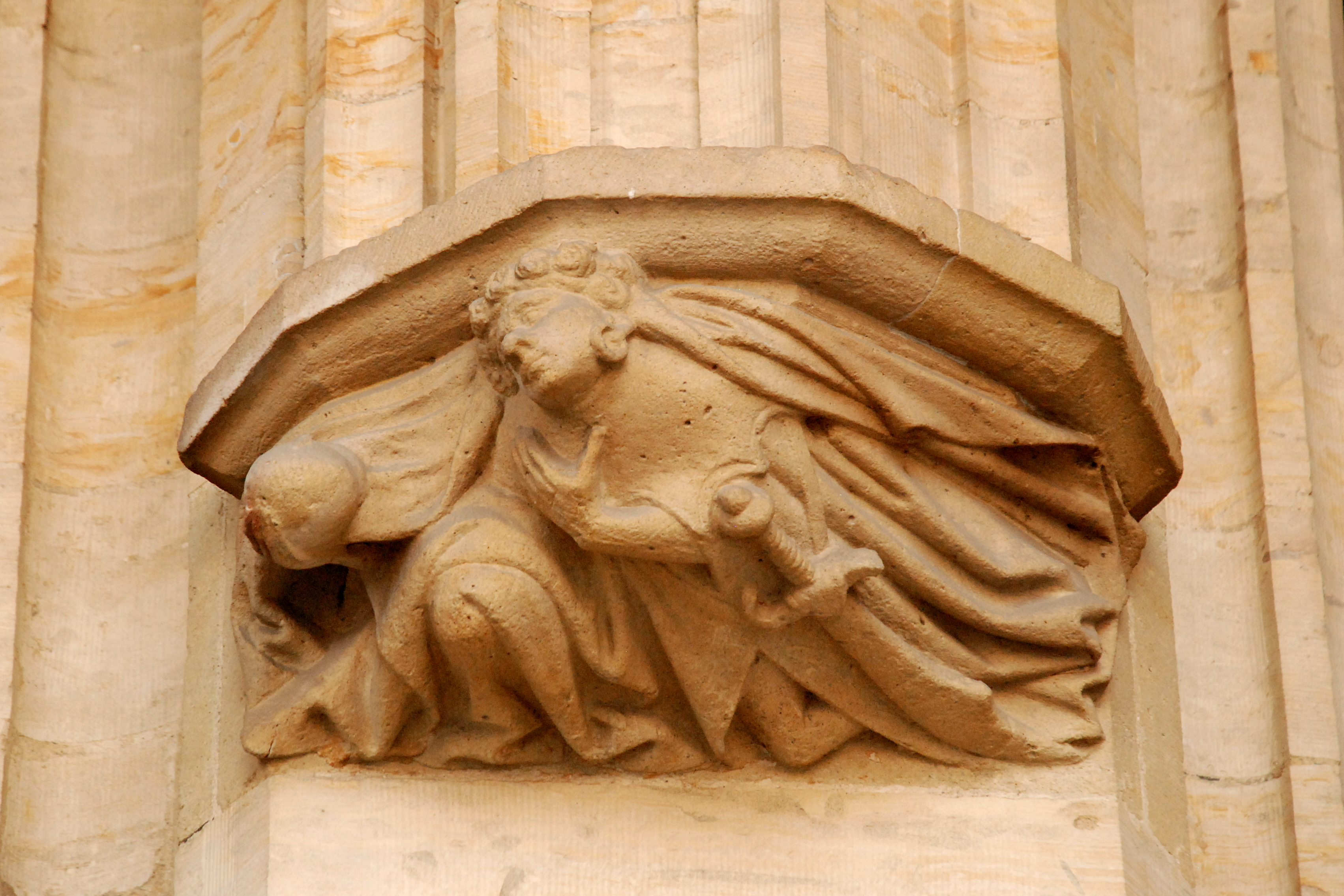 Belgique - Bruxelles - Grand-Place - Maison du Maure